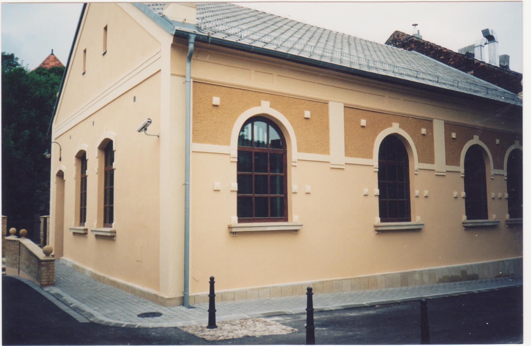 בית הכנסת באושוויינצ'ים, יולי 2002